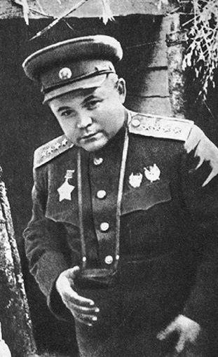 Николай Фёдорович Ватутин (1901 — 1944) — советский военачальник, генерал армии